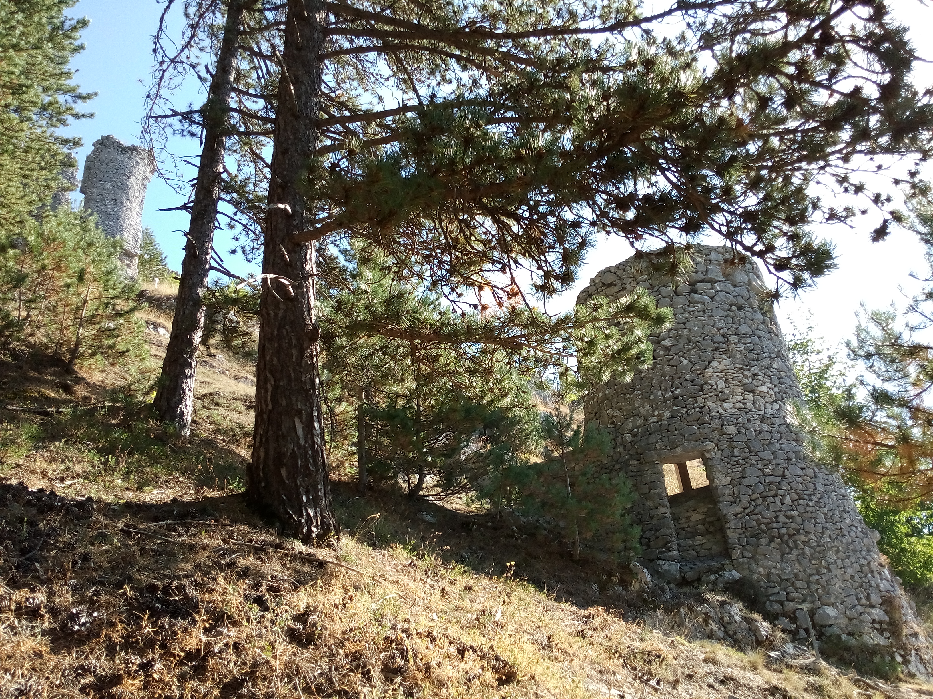 Il castello di Pescasseroli, in Abruzzo